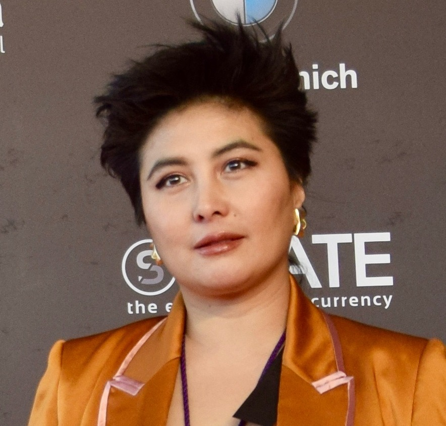 Festival de cinema de Sitges 2018